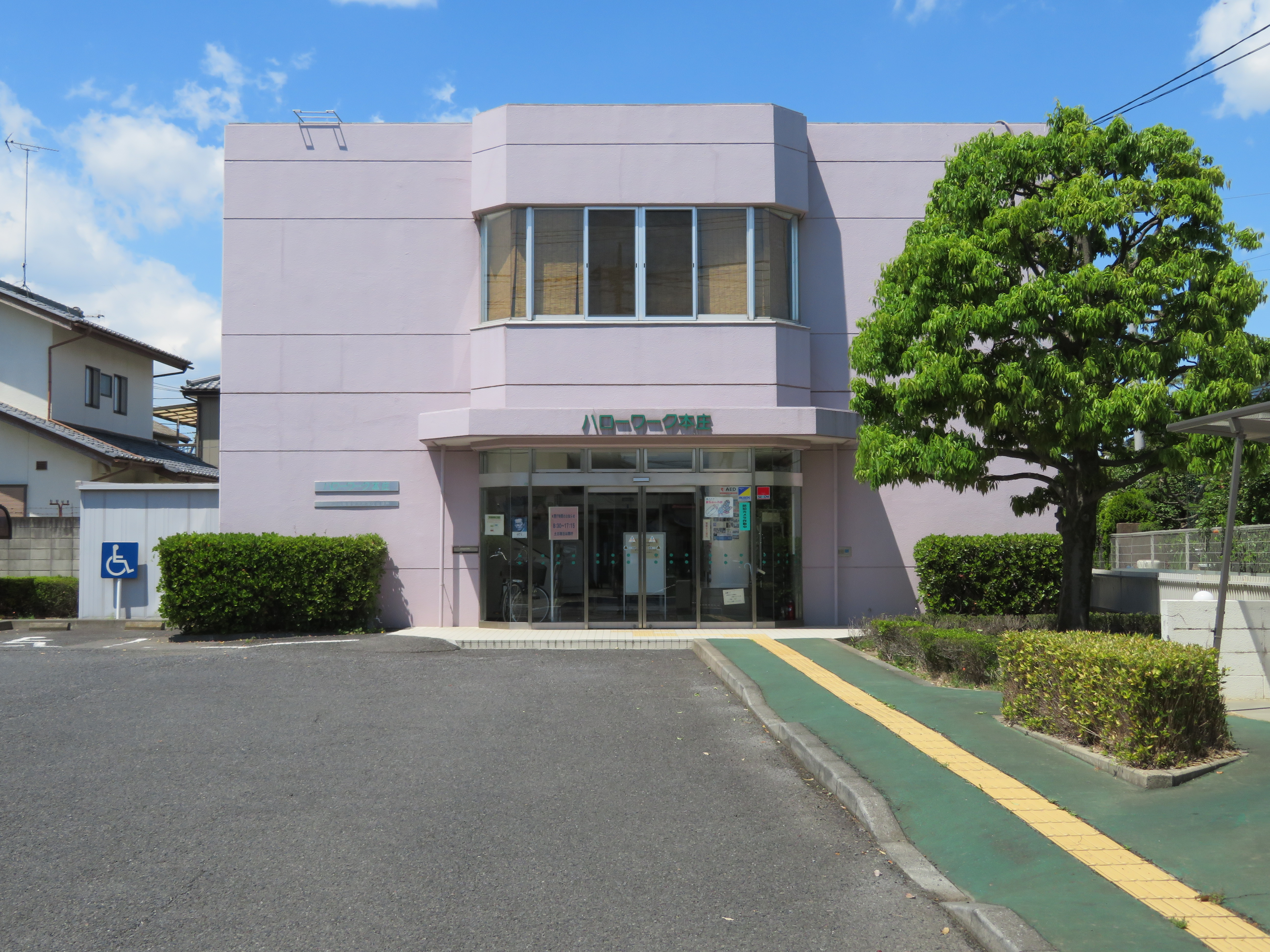 埼玉県本庄市に所在する熊谷公共職業安定所本庄出張所庁舎 Canon PowerShot SX720 HS